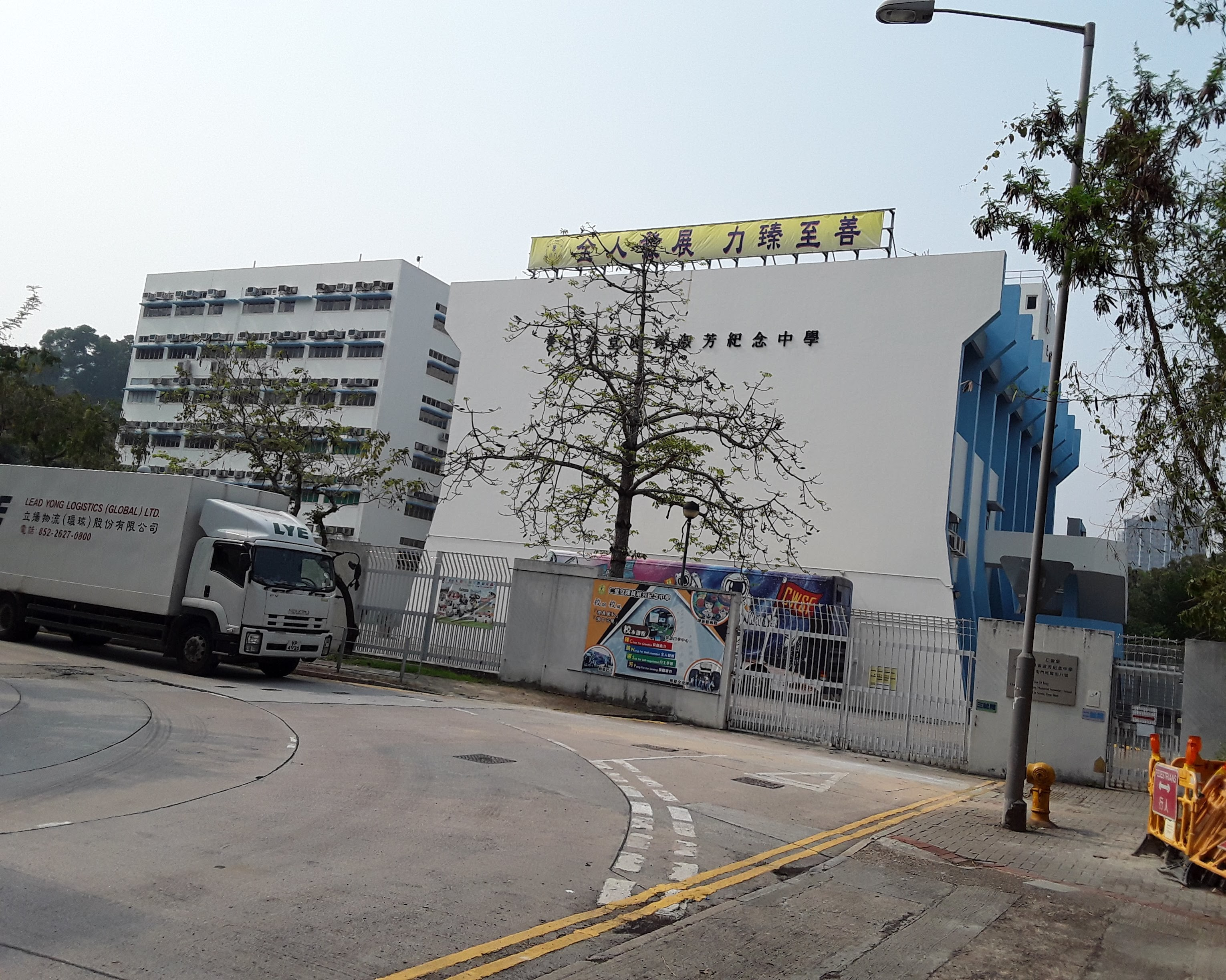 仁愛堂陳黃淑芳紀念中學校舍南面